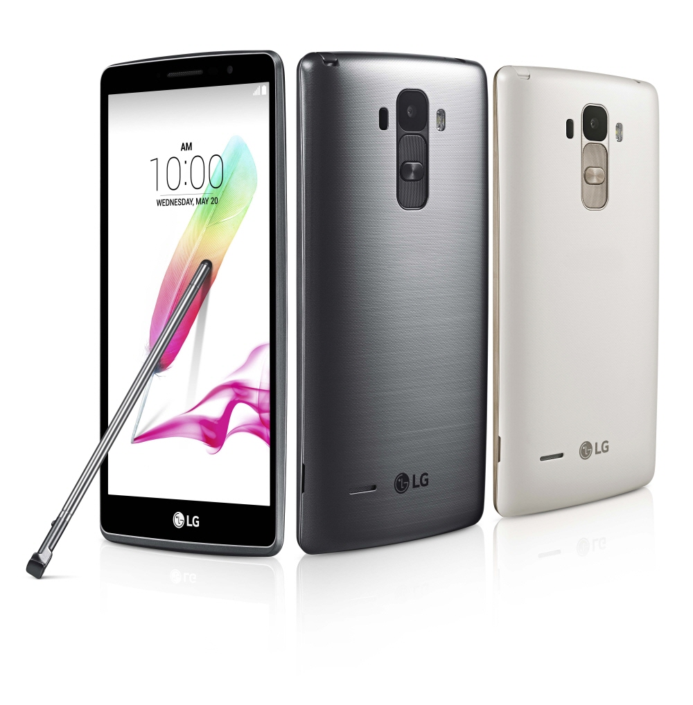 LG전자, ‘G4’ 패밀리 라인업 글로벌 전개 ■ 프리미엄 급 하드웨어, UX 탑재한 ‘G4 스타일러스’, ‘G4c’ 글로벌 출시 ■ 지역별 수요 맞춘 ‘G4’ 하방 전개 라인업… 올해 스마트폰 매출확대 견인 ※ Social LG전자 ( 에서 관련 보도자료를 확인하실 수 있습니다.